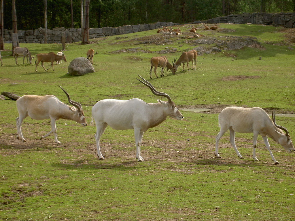 Addax in Kolmården zoo